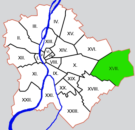 Budapest kerületei: XVII. kerület